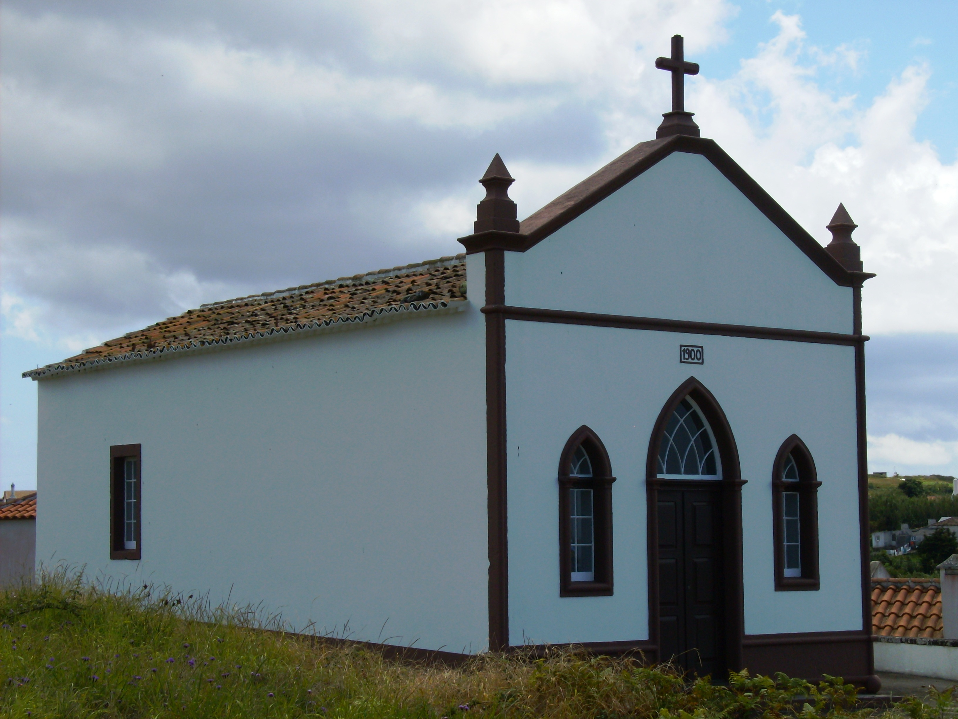 Ermida de Nossa Senhora da Graça, Ilha de Santa Maria (Açores), Portugal.